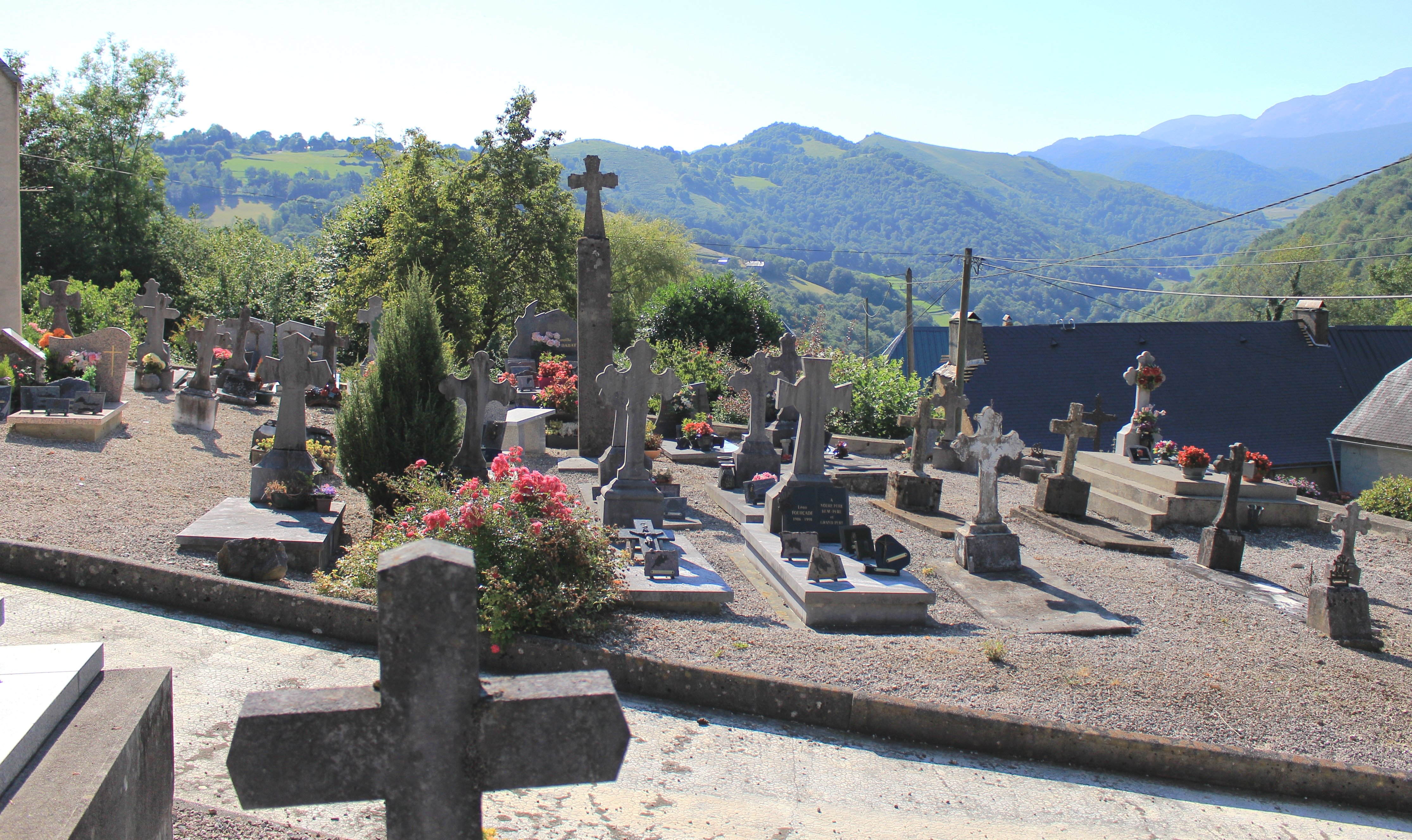 Cimetière de Fréchendets (Hautes-Pyrénées)